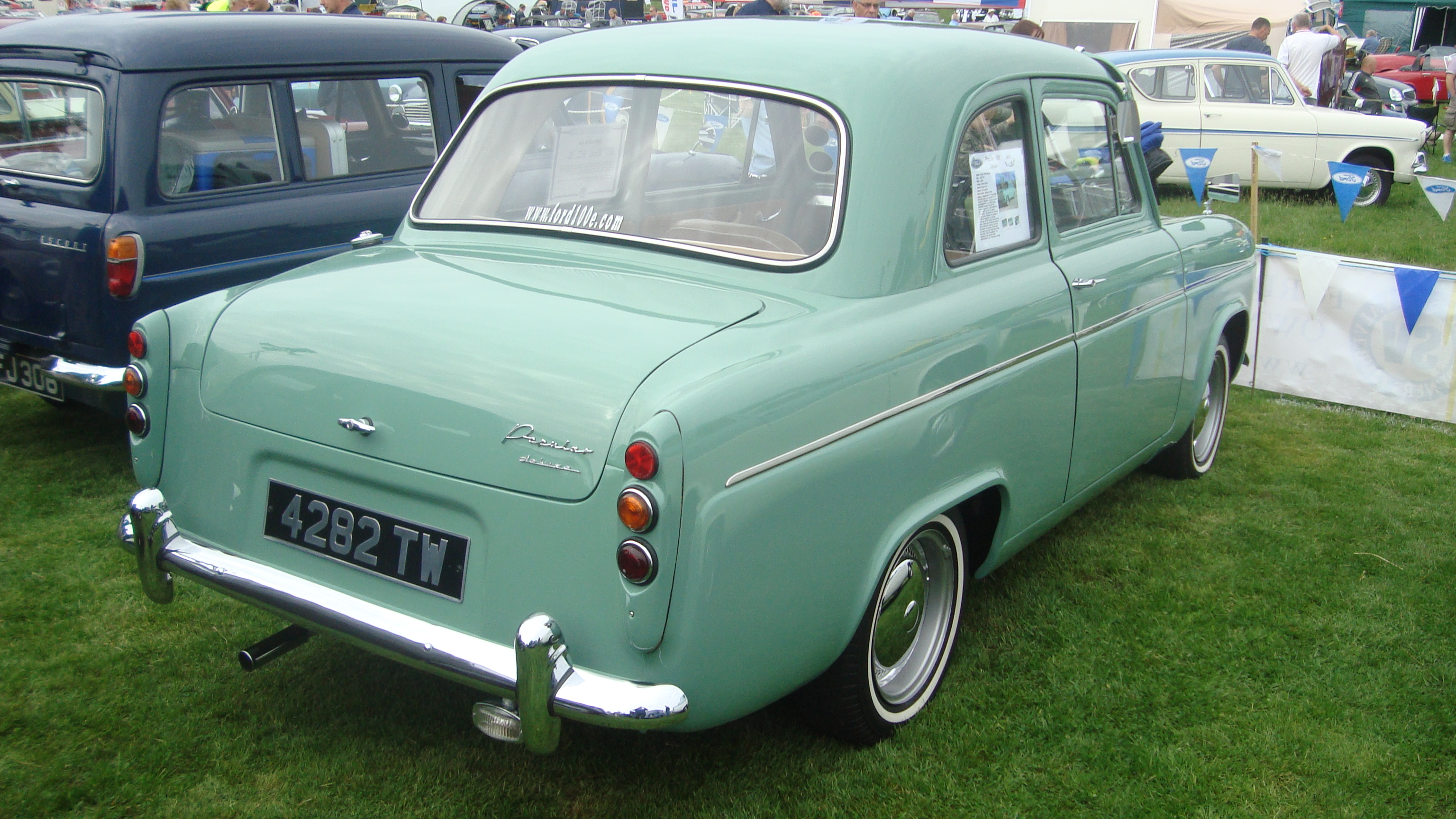 1960 Ford Popular